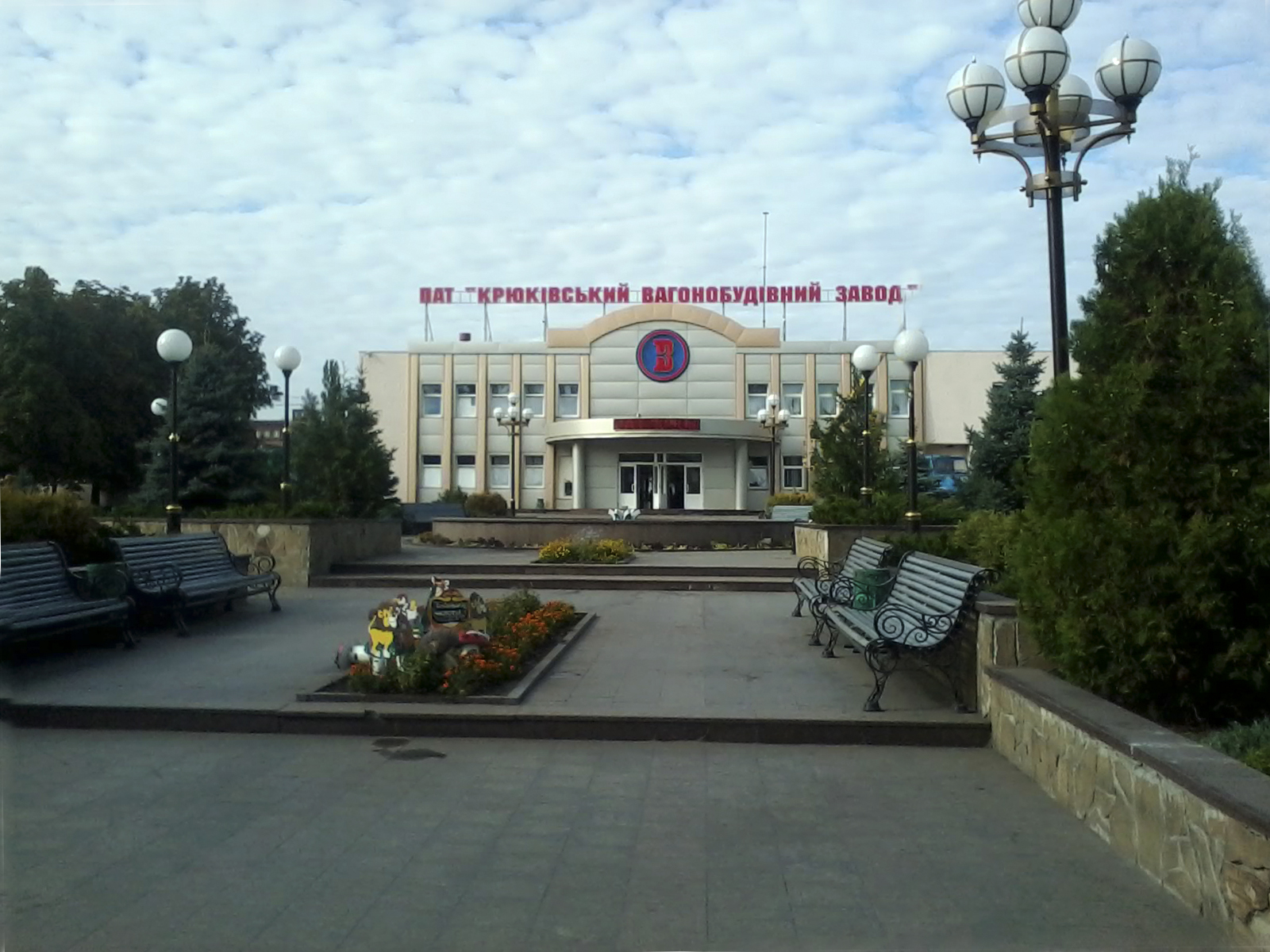 Прохідна КВБЗ, м. Кременчук.